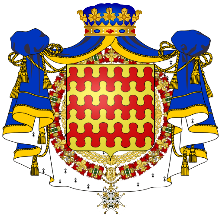 armoiries maillé